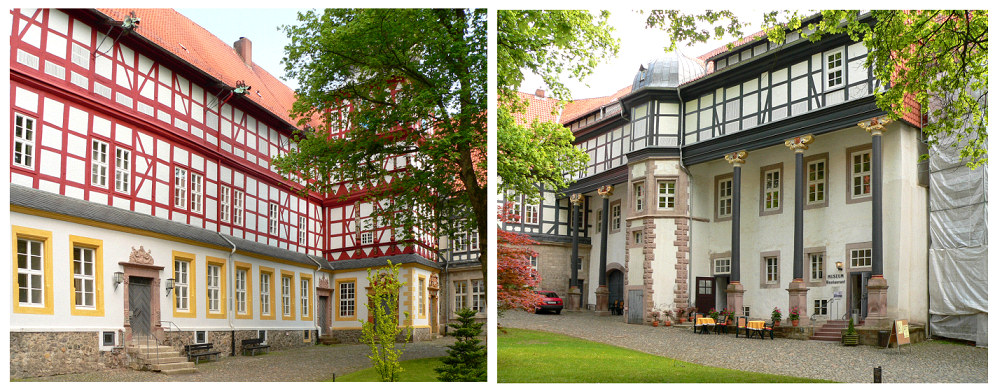 Schloss Herzberg Innenansicht vom Schlosshof